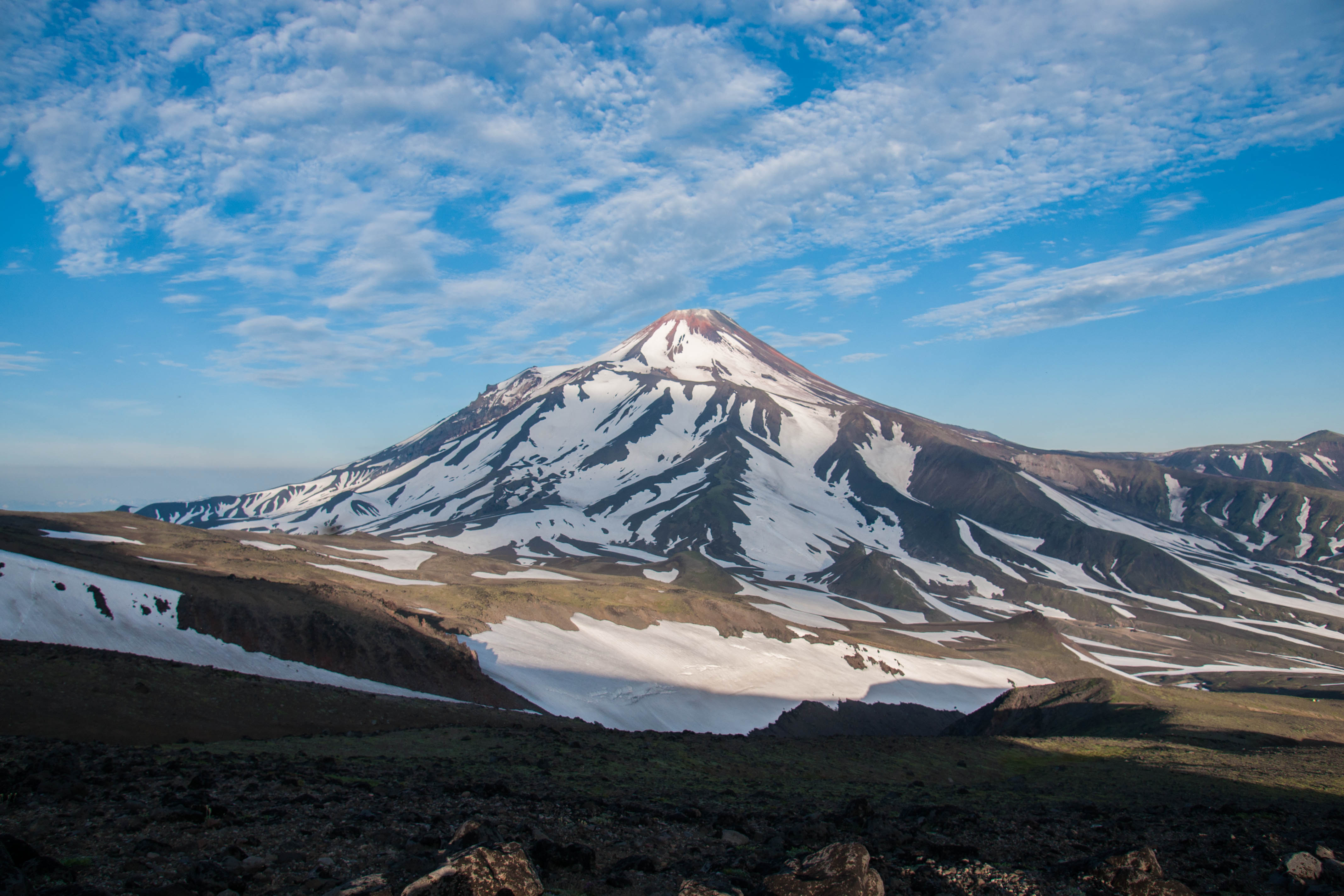 Налычево, Елизовский район, вид на Авачинскую сопку с Корякского вулкана This image is related to the protected area of Russia number 4110038